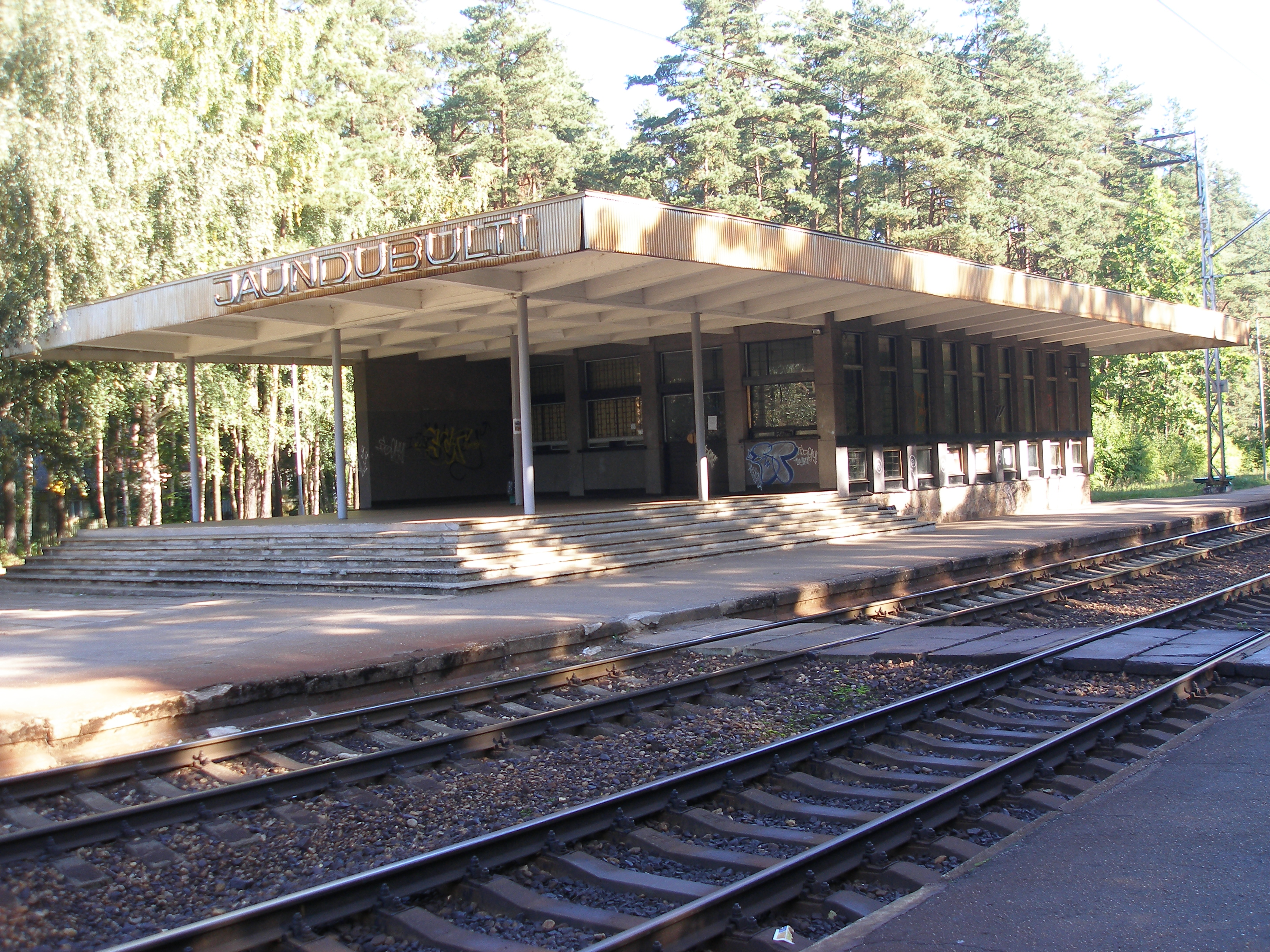 Jaundubultu stacijas ēka.